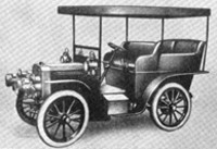 Castro mit 14 PS 4 Zylinder 1902 Sonstiges: von Plattennegativ nachgearbeitet da Original nicht übertragbar war.